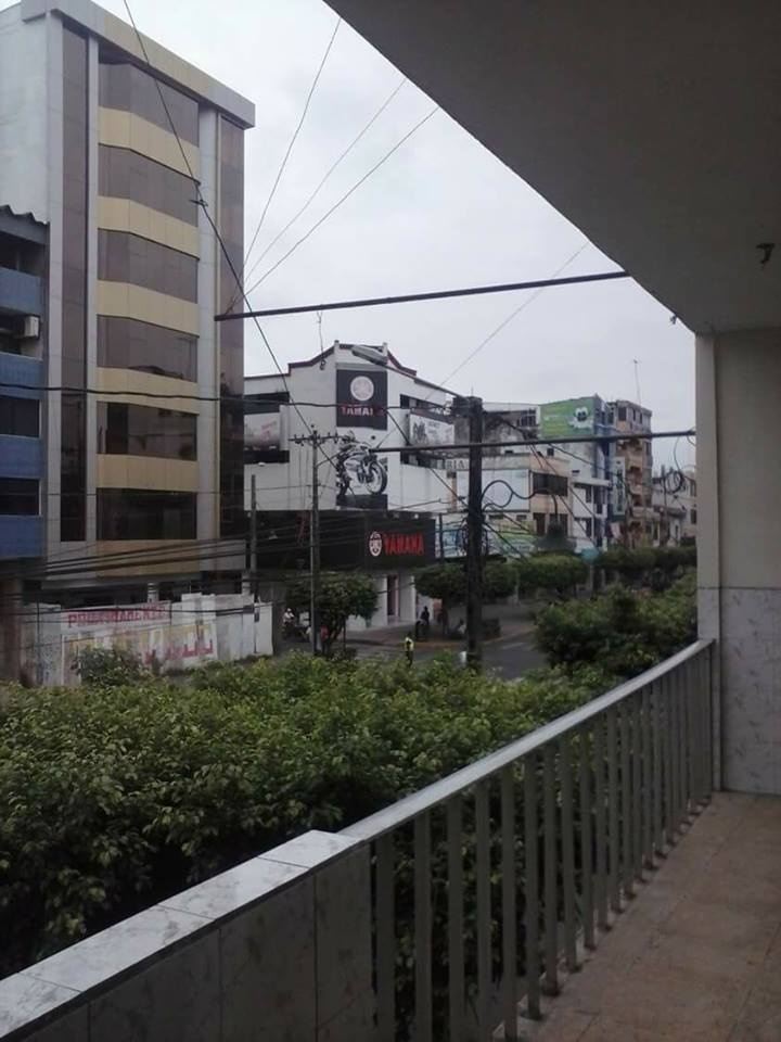 Centro de Quevedo